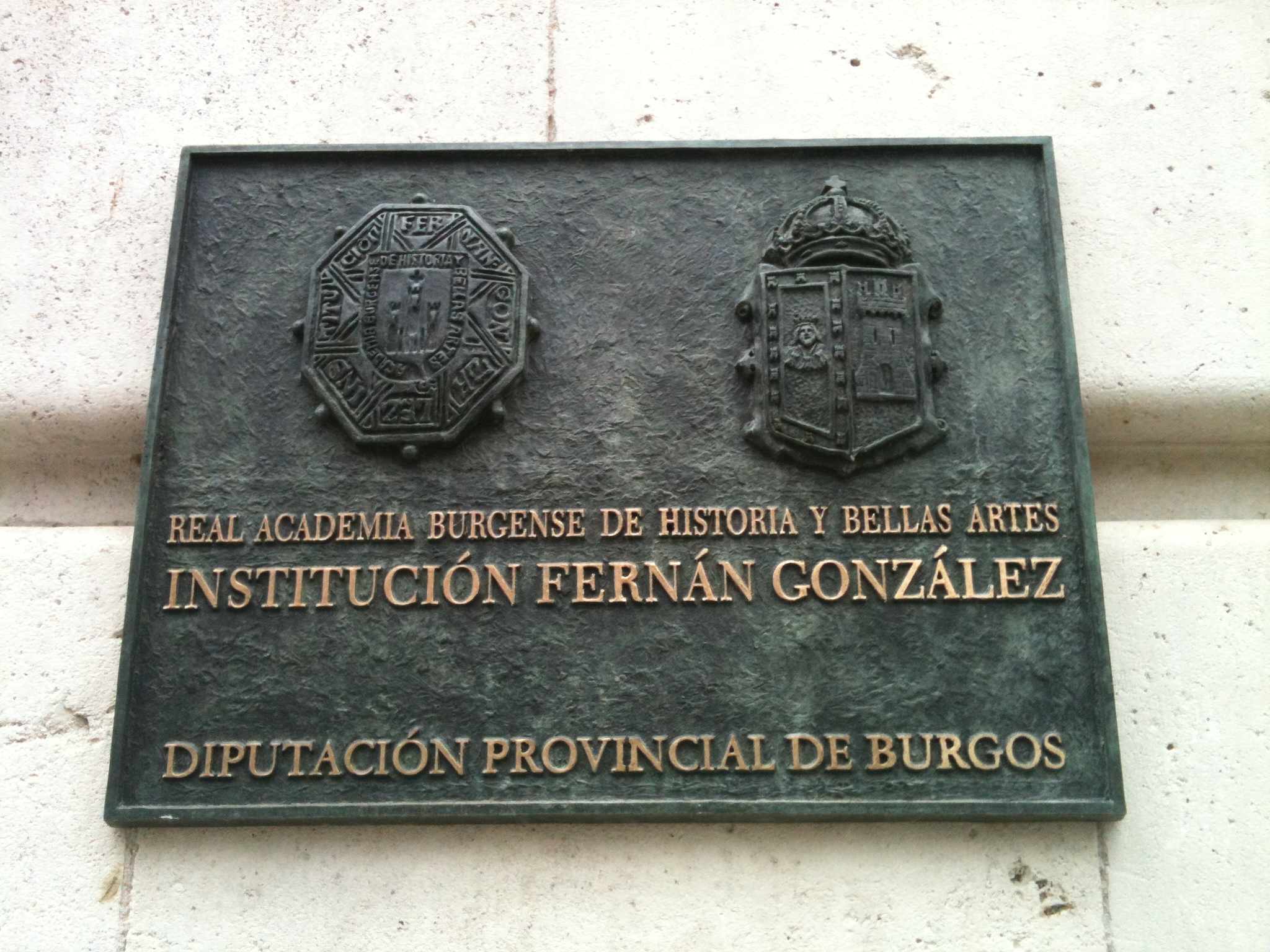 Placa en la fachada del Consulado del Mar de Burgos, sede de la Academia Burgense de Historia y Bellas Artes, Institución Fernán González